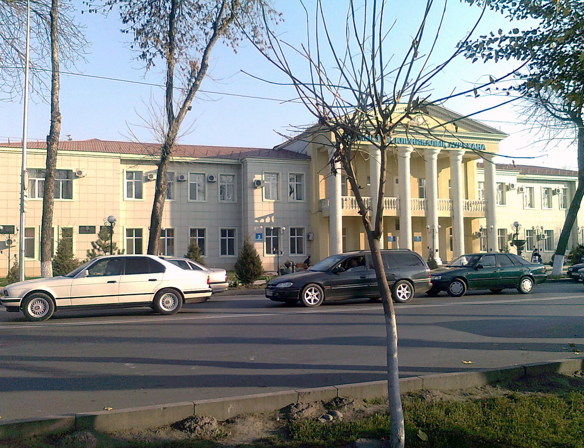 Областная клиническая больница в г. Шымкент (на Советской).